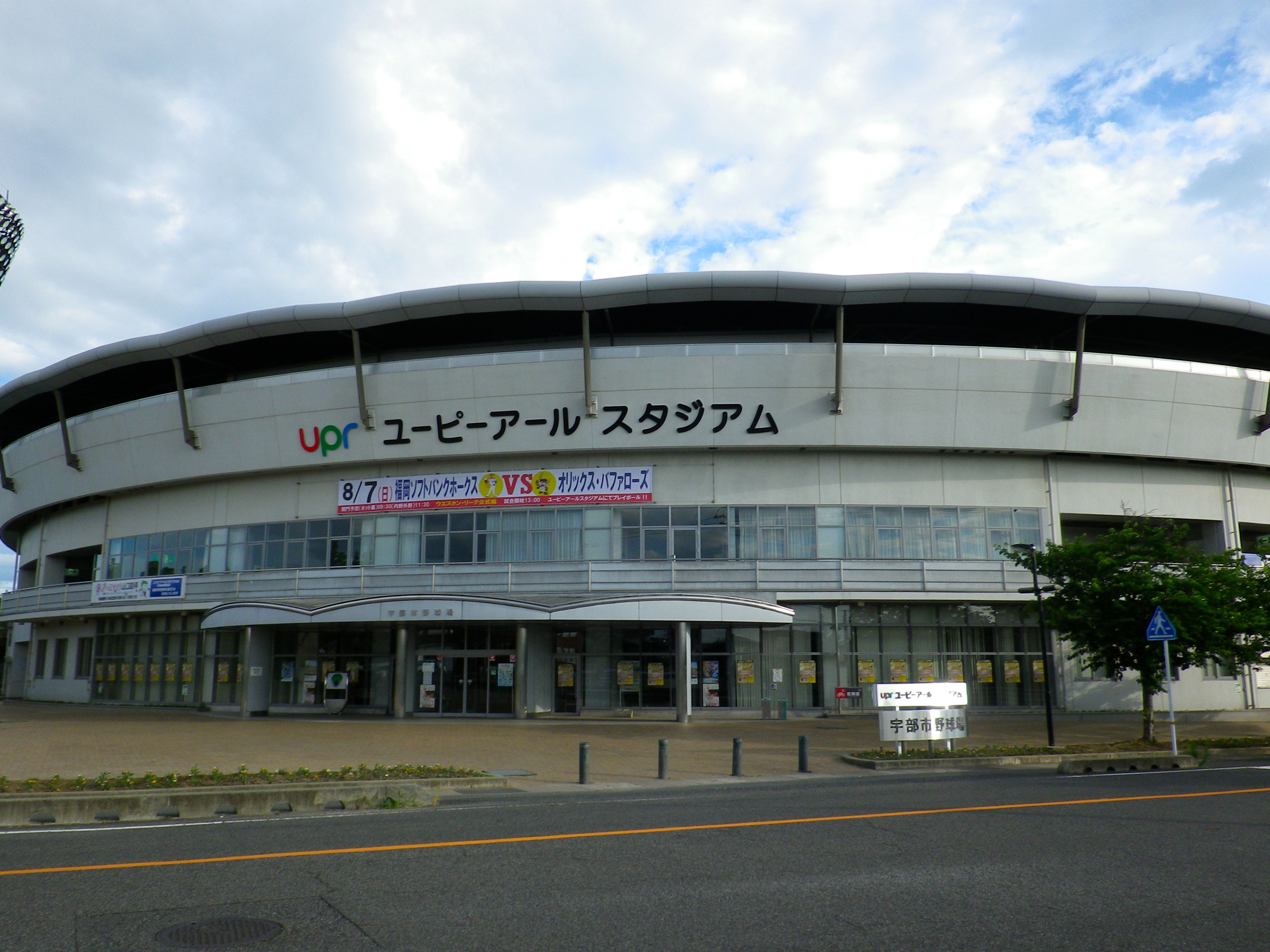 山口県宇部市。恩田運動公園野球場。2011年7月11日撮影。